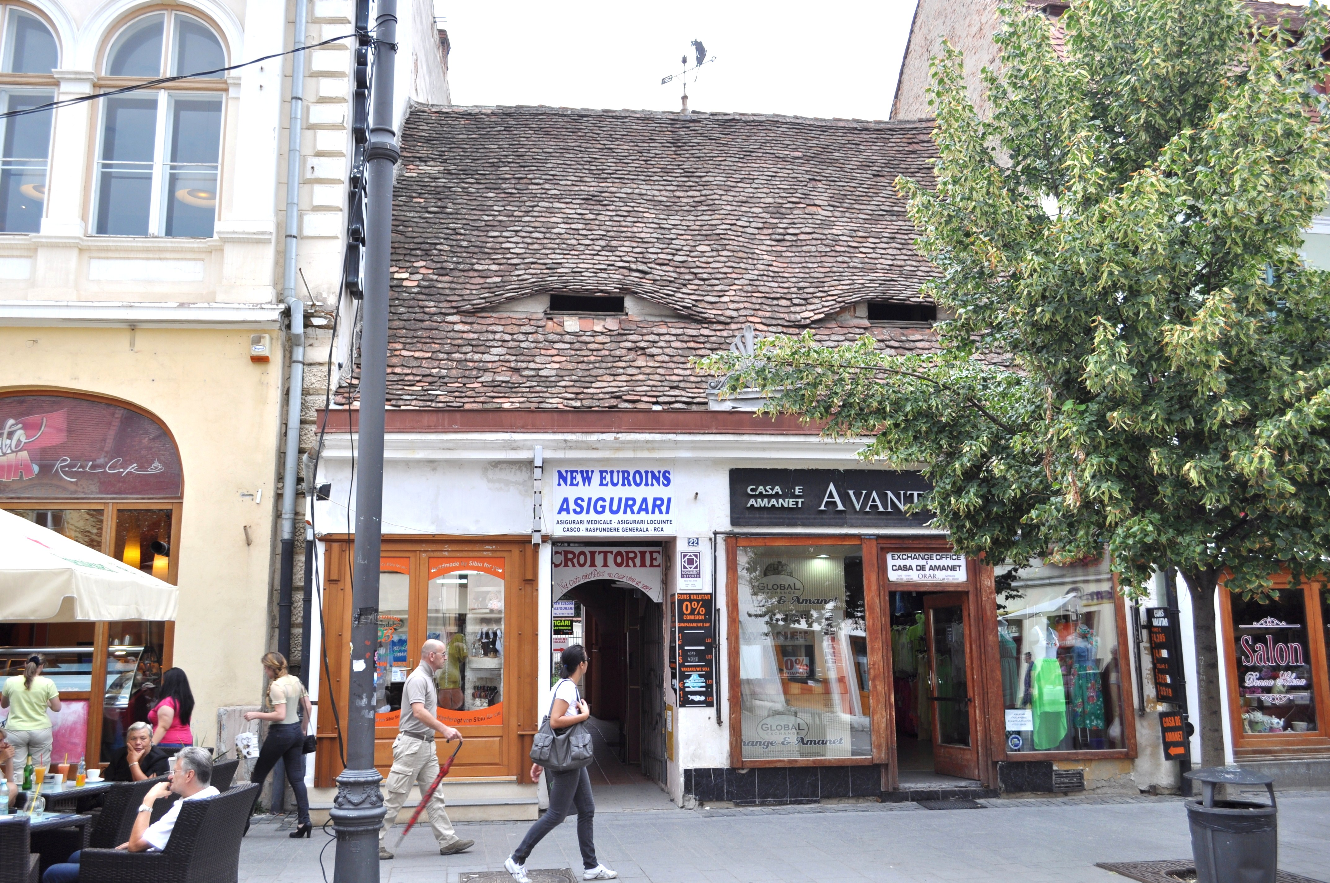 Clădire monument istoric, str.Nicolae Bălcescu, nr.22